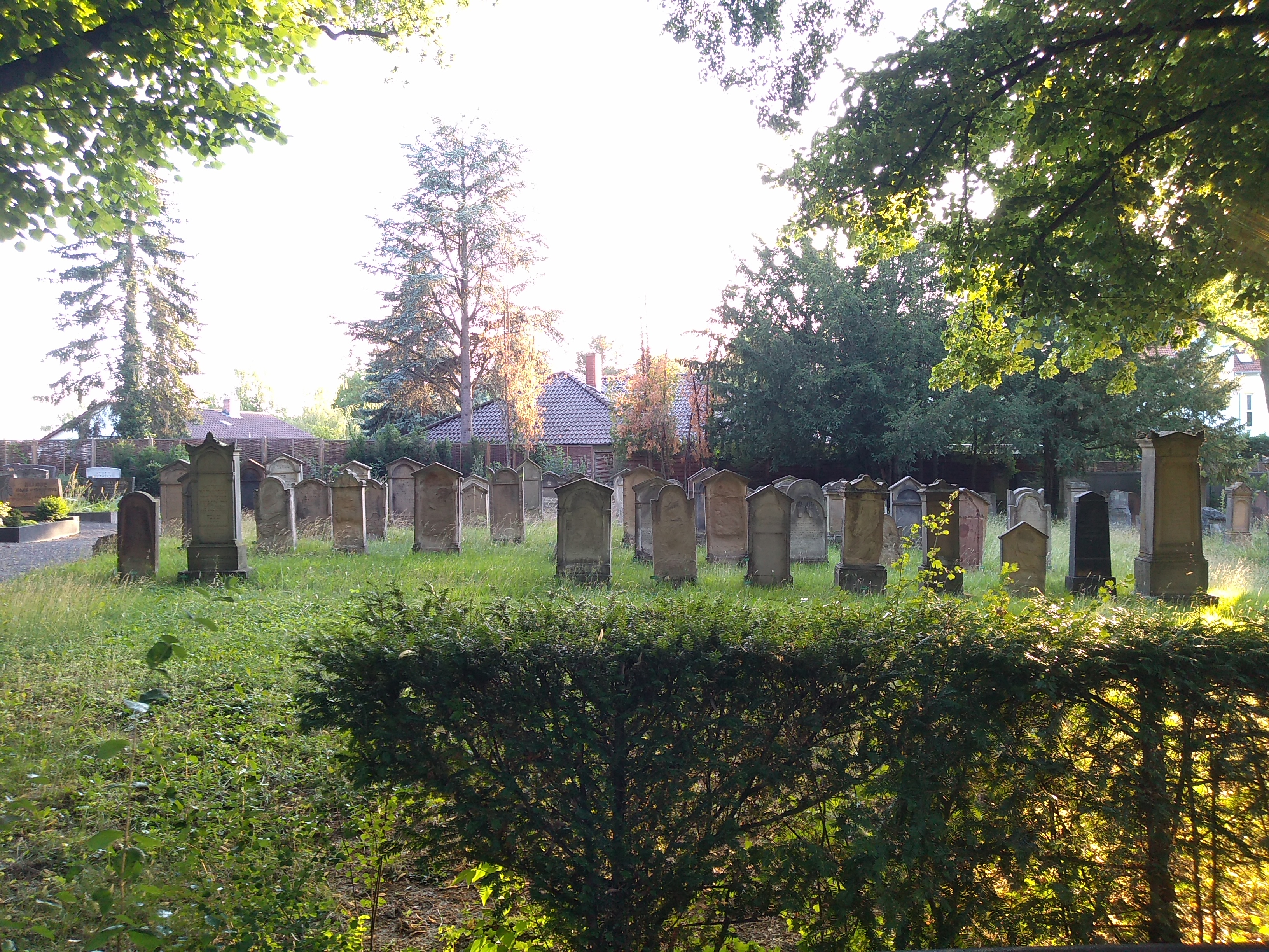 Denkmalzone „Alter Jüdischer Friedhof“ auf dem städtischen Friedhof der Stadt Alzey, Landkreis Alzey-Worms, Rheinland-Pfalz, Deutschland. Kulturdenkmal gemäß Denkmalliste des Landes Rheinland-Pfalz (Stand: 31. Juli 2018). 1810 am christlichen Friedhof angelegt, um 1870 erweitert; bis zu 140 Grabsteine, spätes 18. Jahrhundert bis 1905. Die in der Denkmalliste angegebene Zahl von ca. 300 Grabsteinen erscheint angesichts dieses Fotos nur plausibel, wenn die ca. 160 Grabsteine der benachbarten Denkmalzone „Neuer Jüdischer Friedhof“ mitgezählt werden.